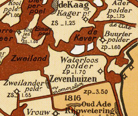 Waterloospolder